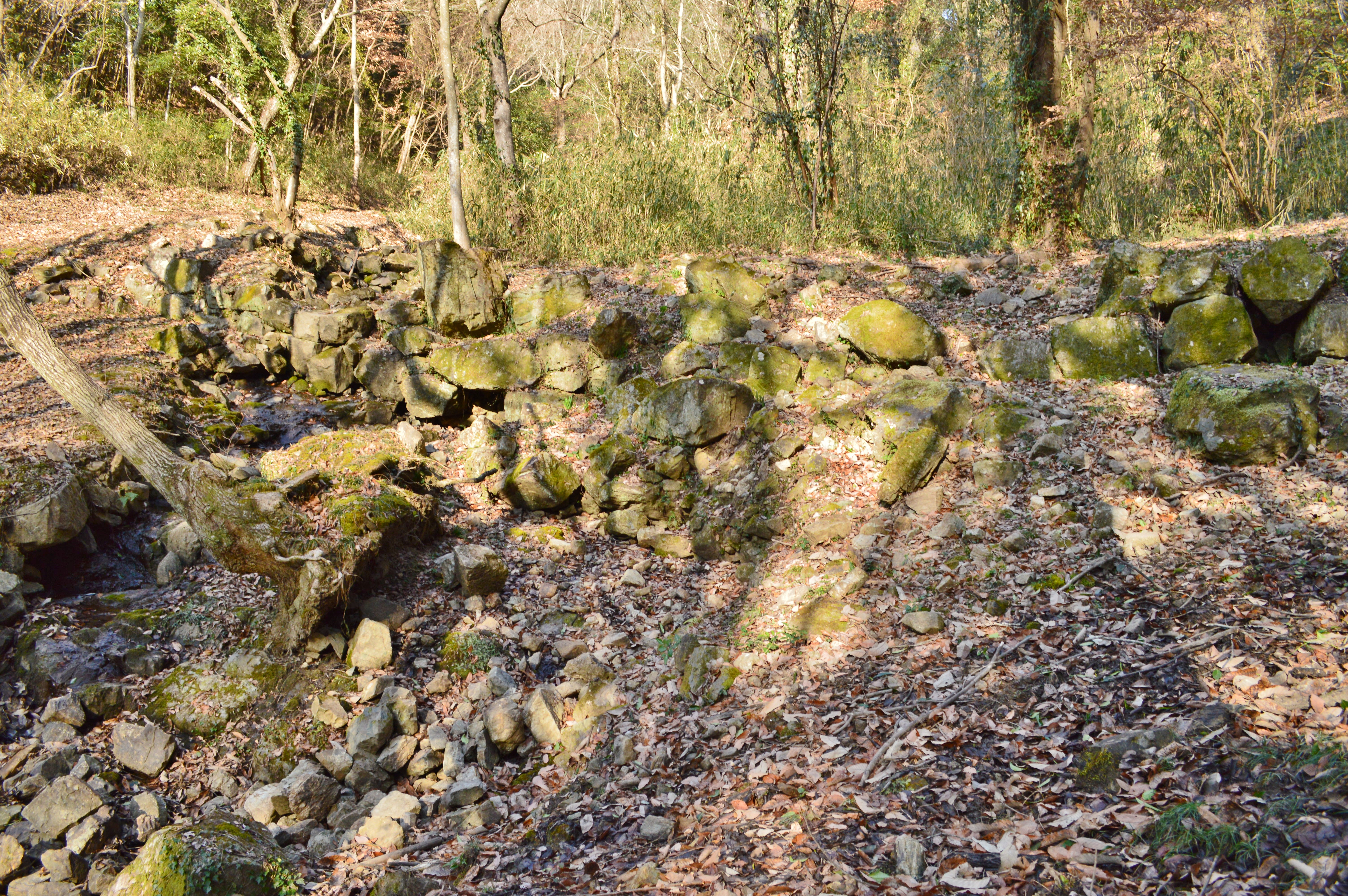 大廻小廻山城跡 一の木戸跡 Nikon D3200